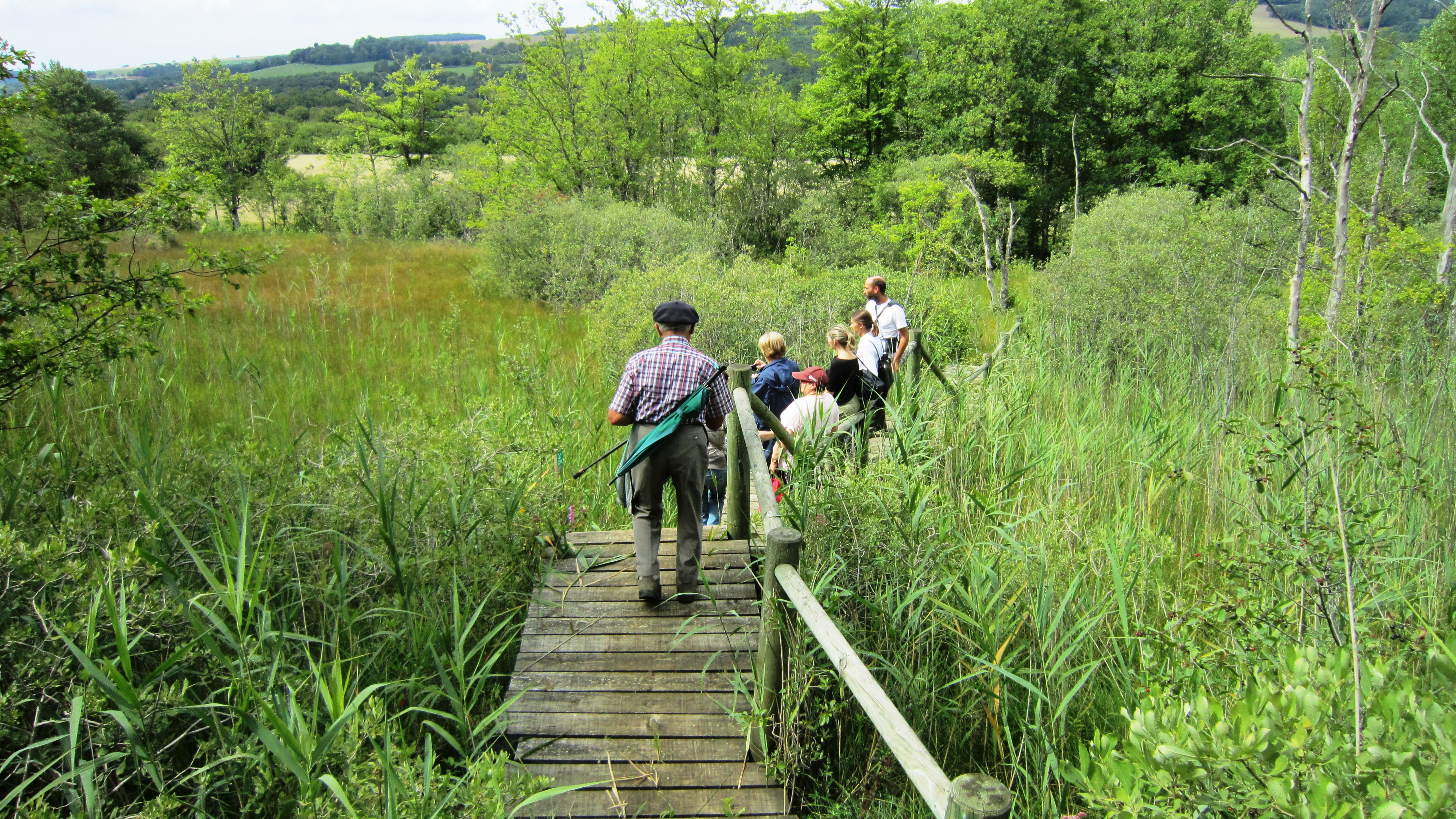 Passage aménagé dans un marais tufeux du Châtillonnais